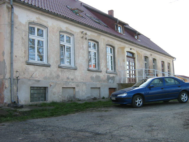 Zabytkowy dom w Mokrzycy Małej